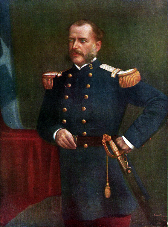 Eleuterio Ramírez Molina (Osorno; 18 de abril de 1836 - † Tarapacá; 27 de noviembre de 1879) Militar chileno, héroe de la Batalla de Tarapacá.